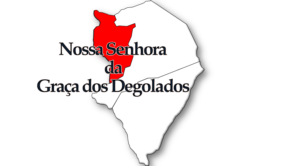 Evolução da População